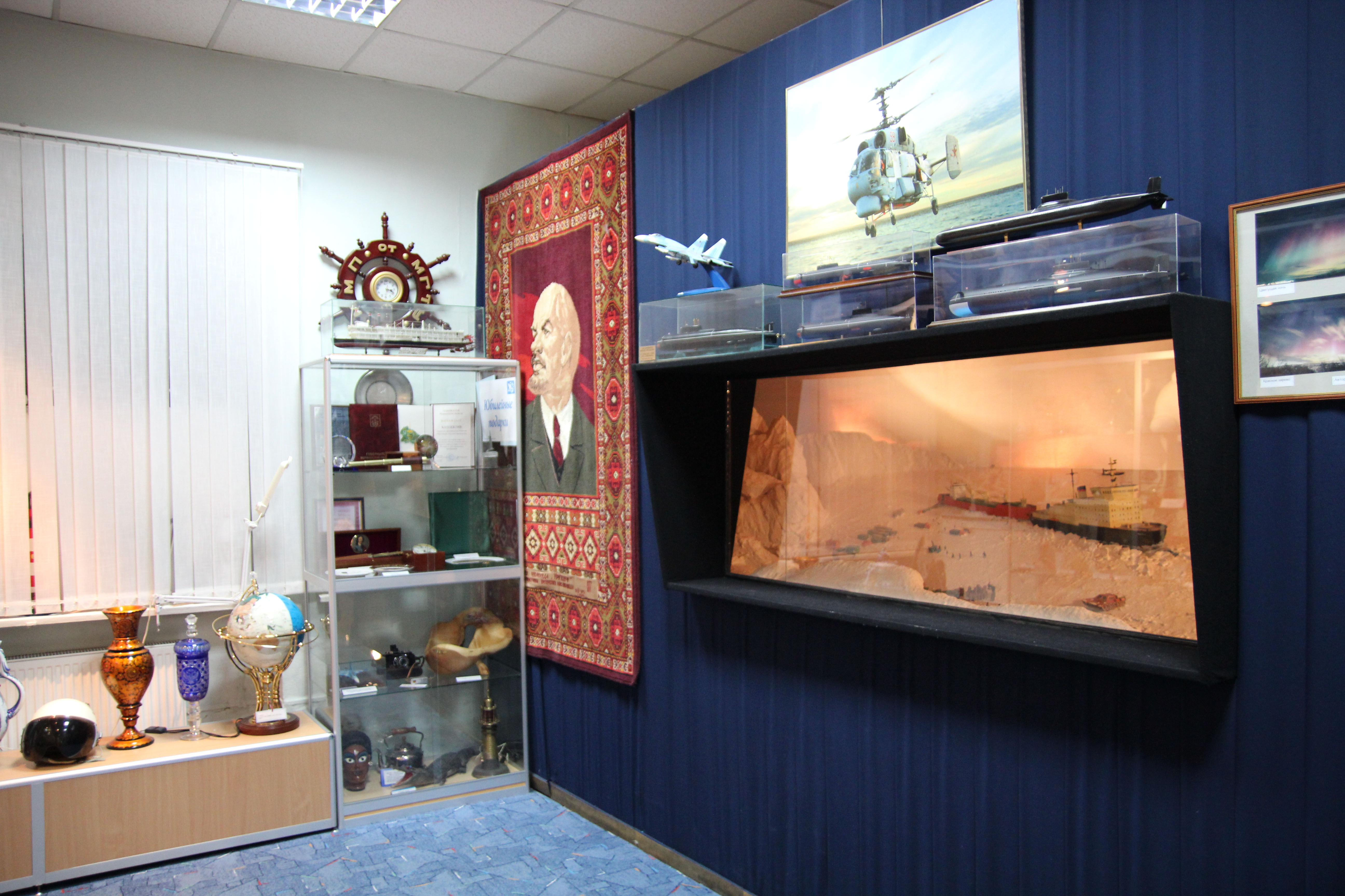 В музее ММП